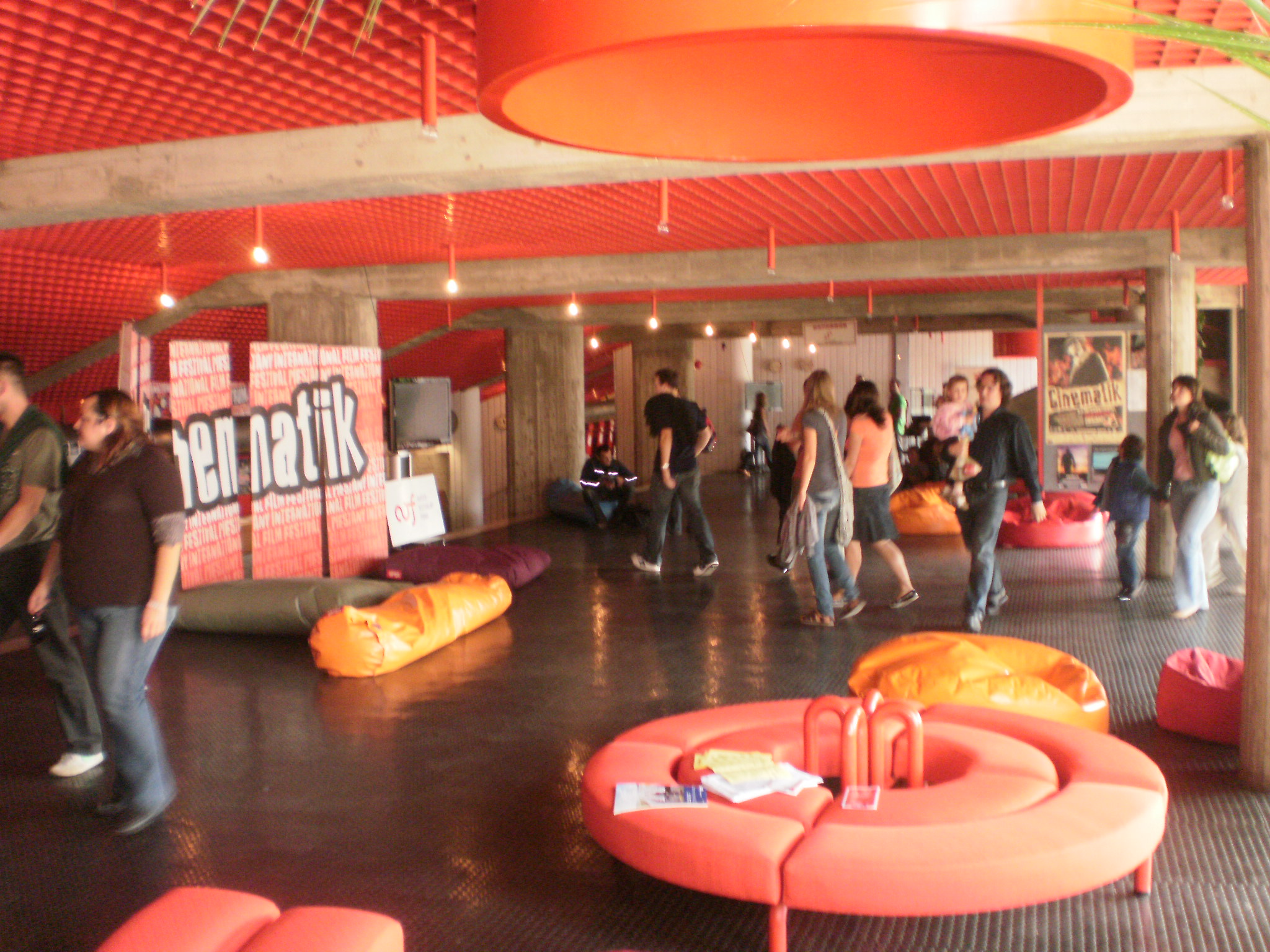 Akreditačné centrum v budove Domu Umenia.